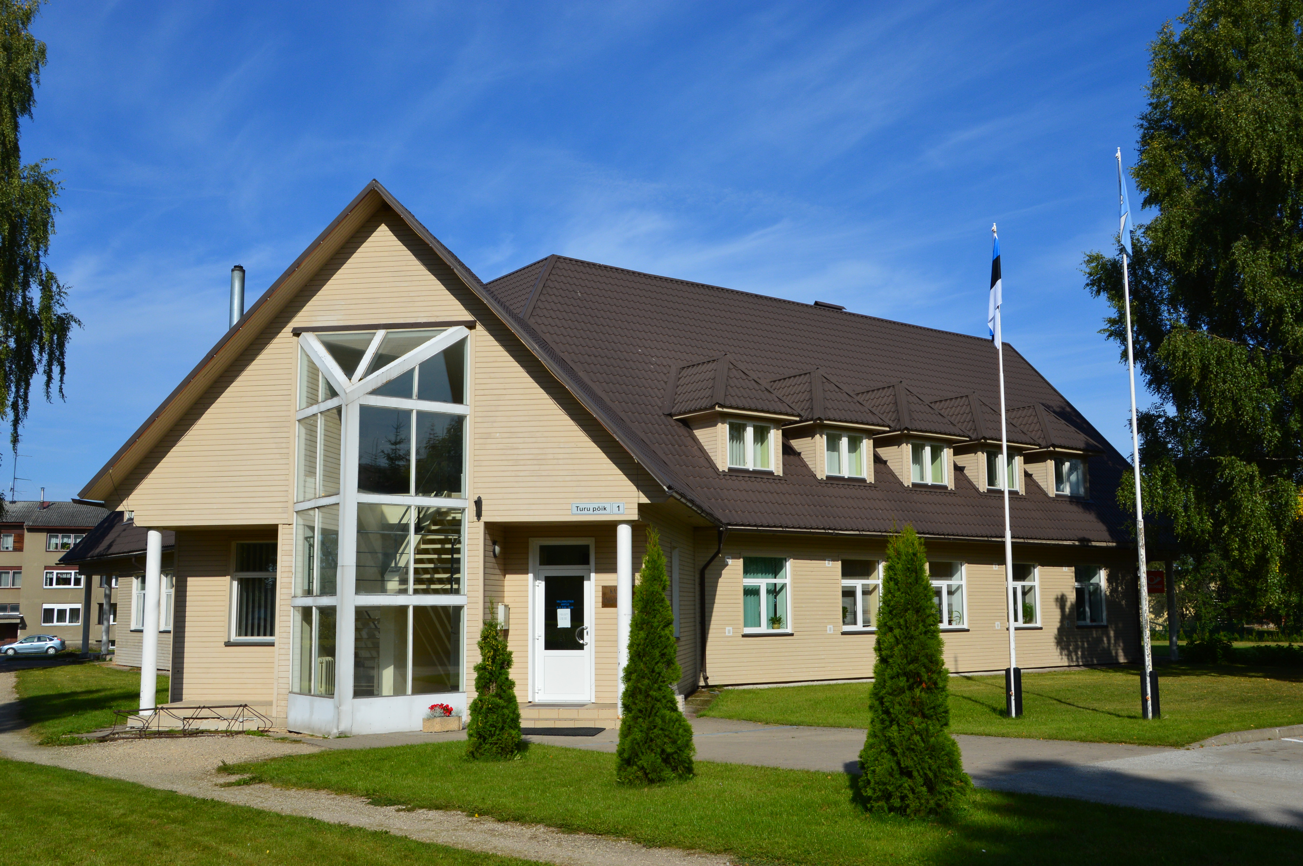 Kanepi vallavalitsuse hoone